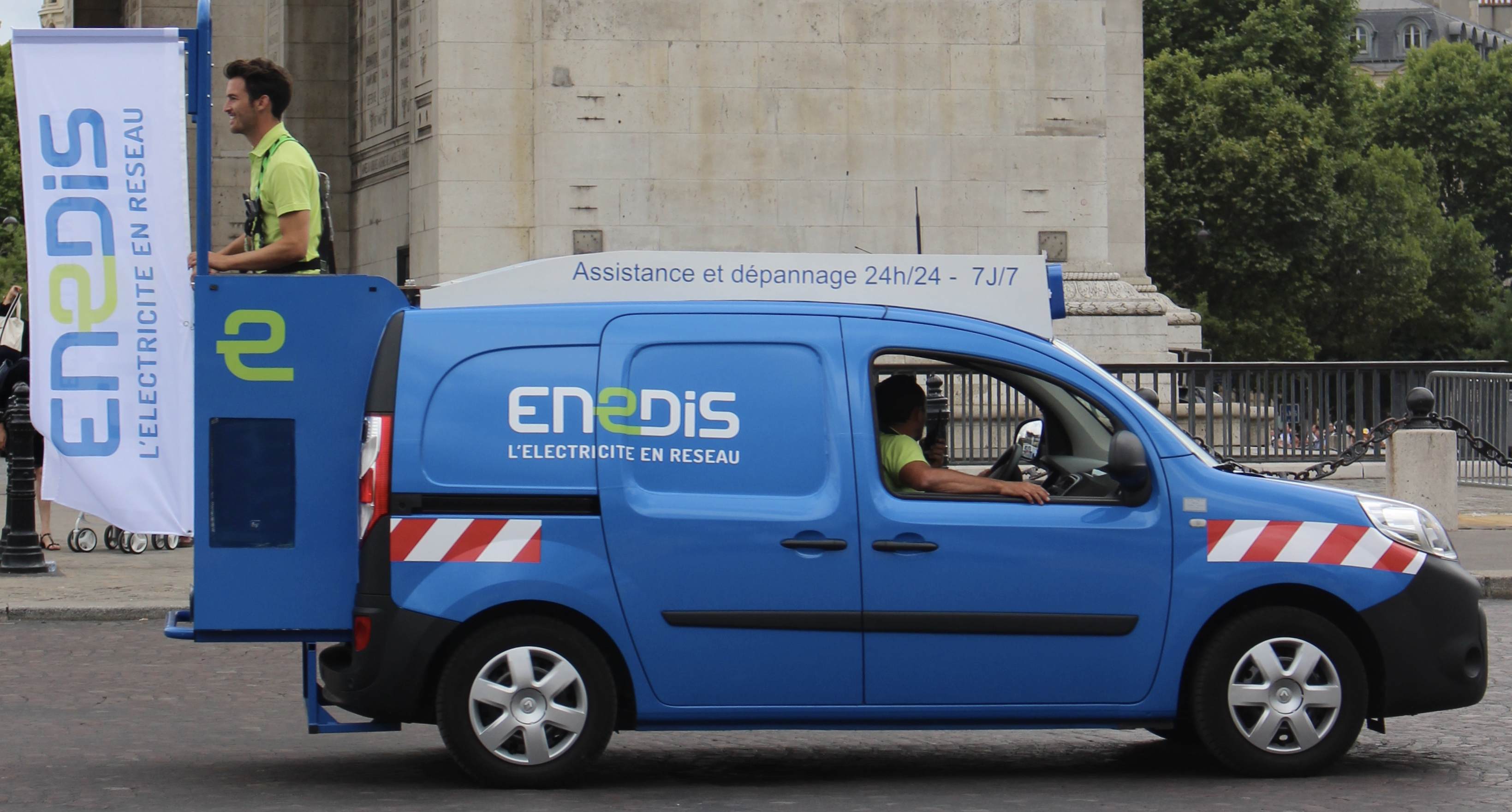 Véhicule de la caravane du Tour de France le 23 juillet 2017 sur le rond-point de l'Arc de Triomphe à Paris.